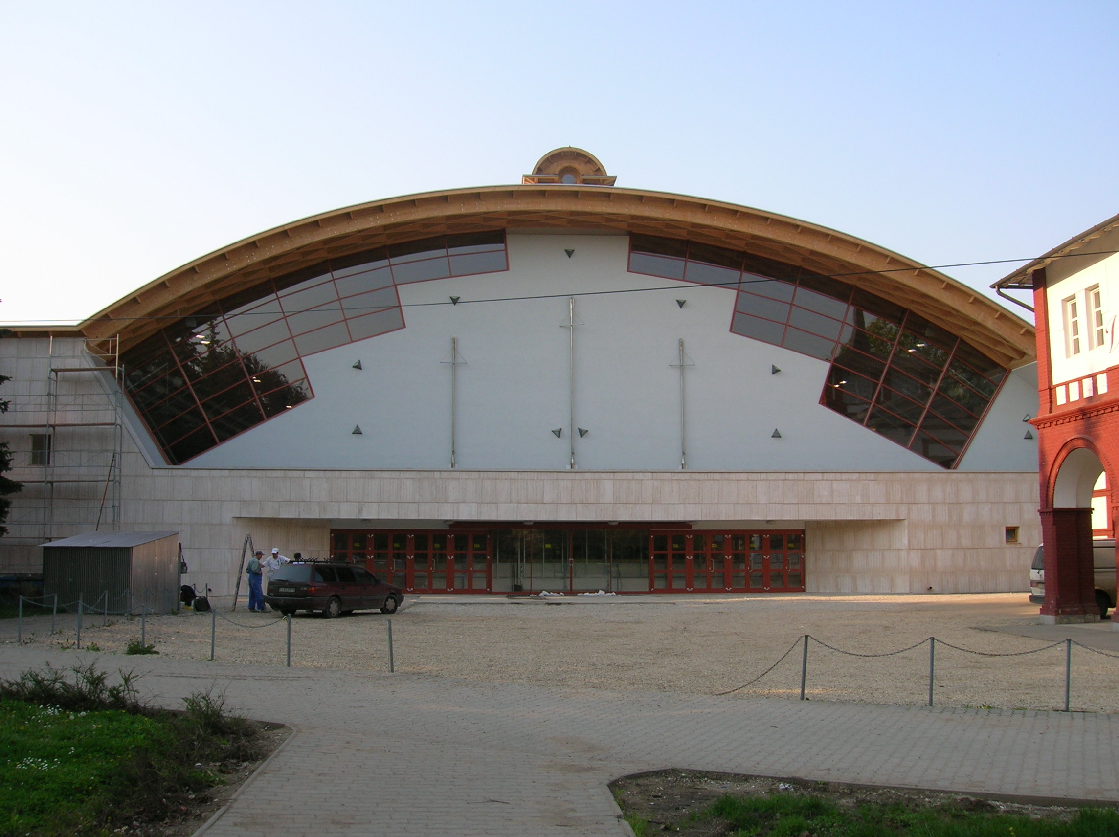 Jégcsarnok ("Ice Hall"), a new sports hall in the Népkert ("People's Garden") public park, Miskolc, Hungary. - Miskolc, Miskolc Városi Jégcsarnok, Dusik Lajos sétány